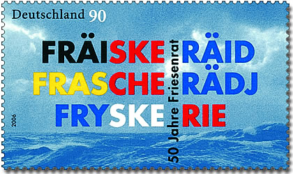 Briefmarke der Deutschen Post aus Anlaß des 50. Jahrestages der Wiedergründung des Friesenrates